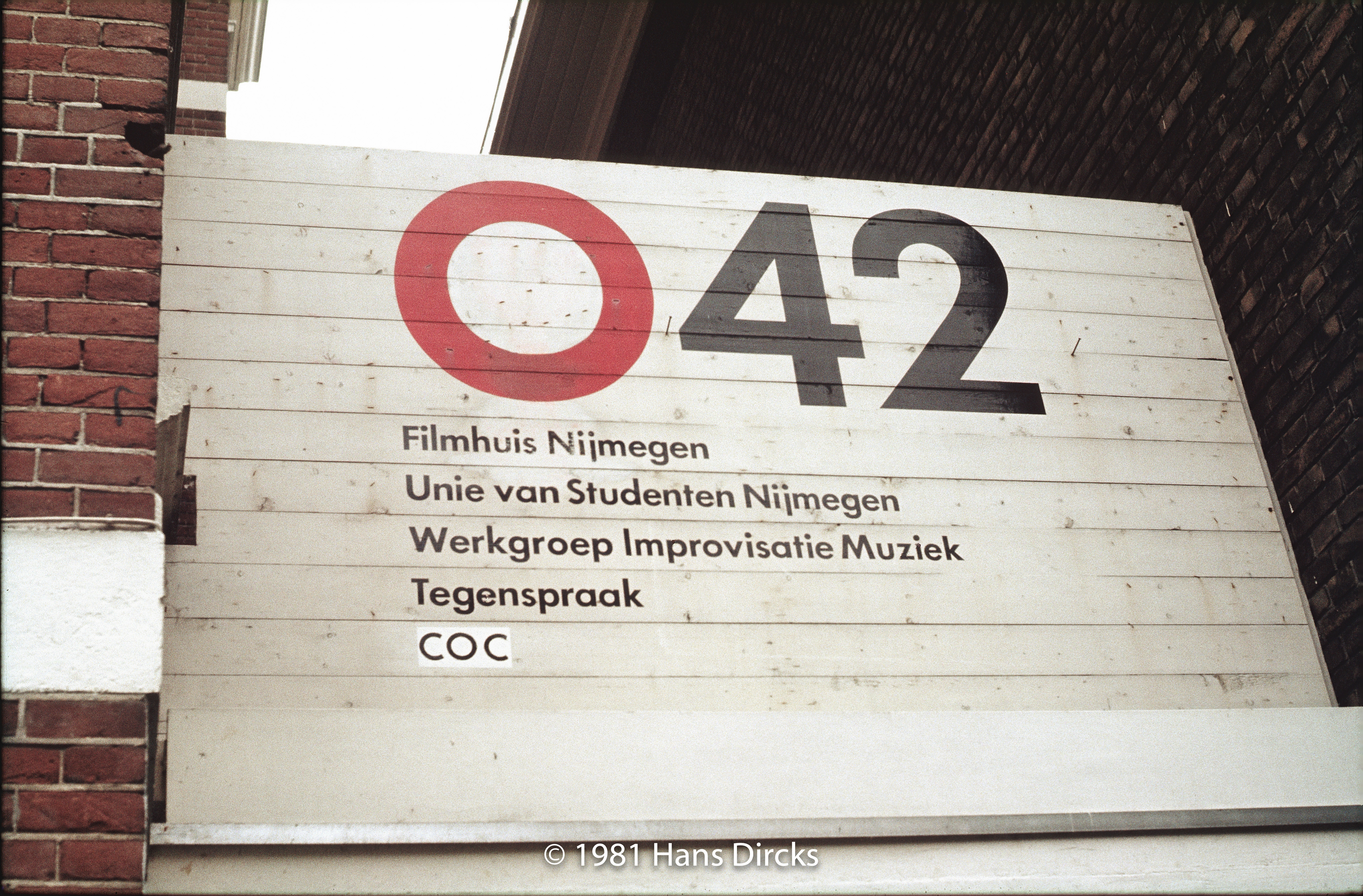 Bord boven zij-ingang pand O42; COC-Nijmegen houdt kantoor in de kelder van O42, samen met Tegenspraak, Werkgroep Improvisatie Muziek, Unie van Studenten Nijmegen en Filmhuis Nijmegen. Foto: Hans Dircks.